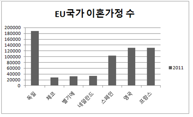 높은 독일의 이혼율